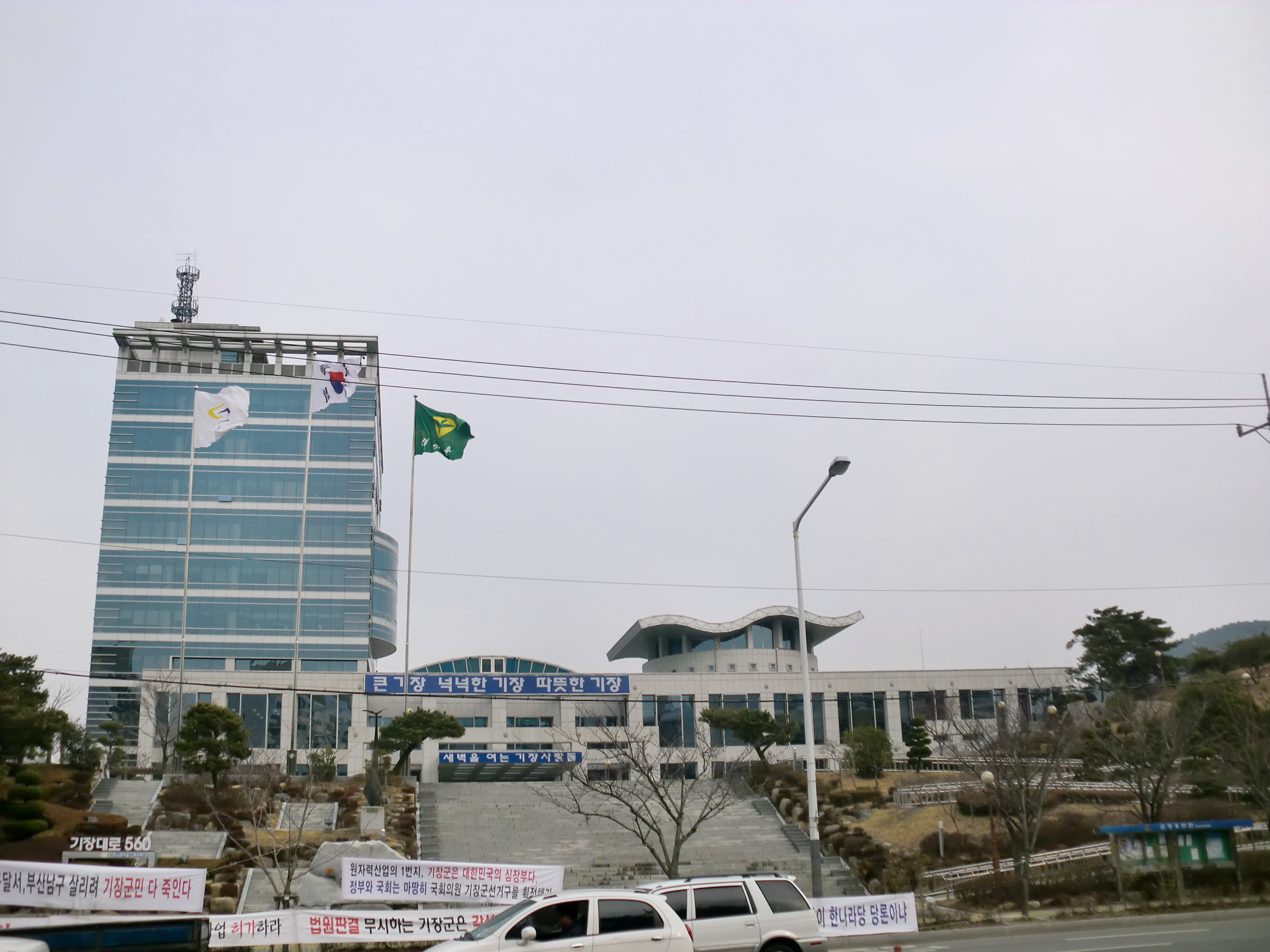 부산광역시 기장군에 있는 기장군청